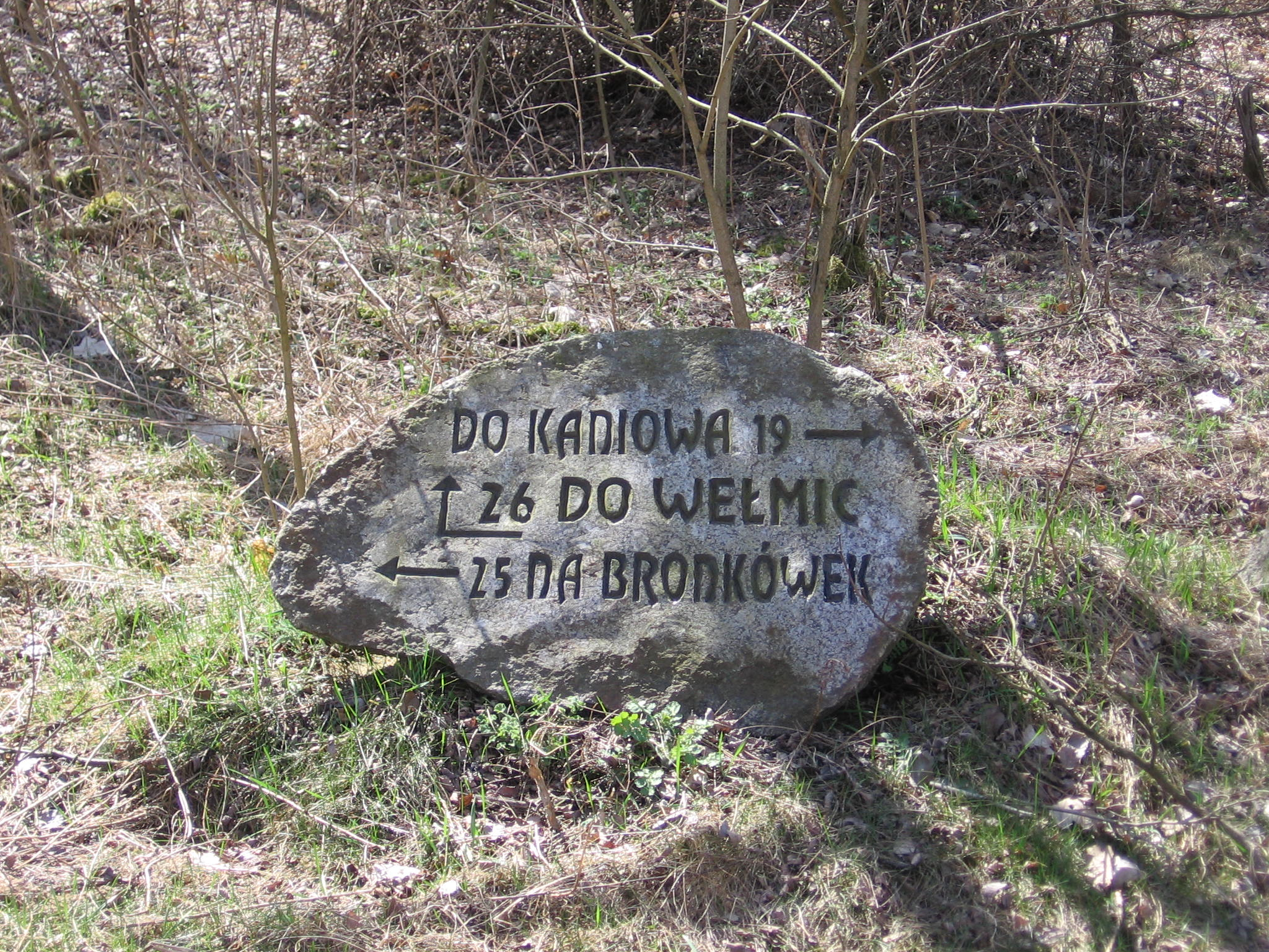 kamienny drogowskaz z okolic Bronkowa